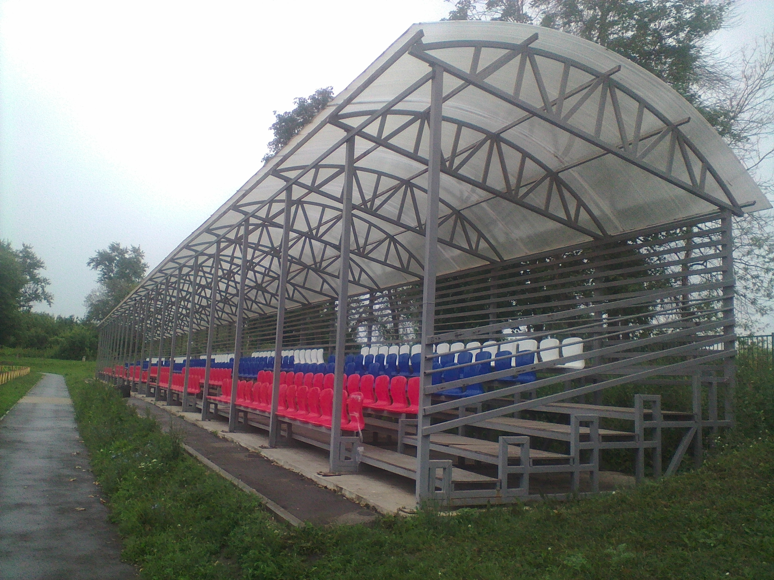 Муниципальный стадион в Узловой (бывший стадион «Кран»). Вместимость: около 700 зрителей.